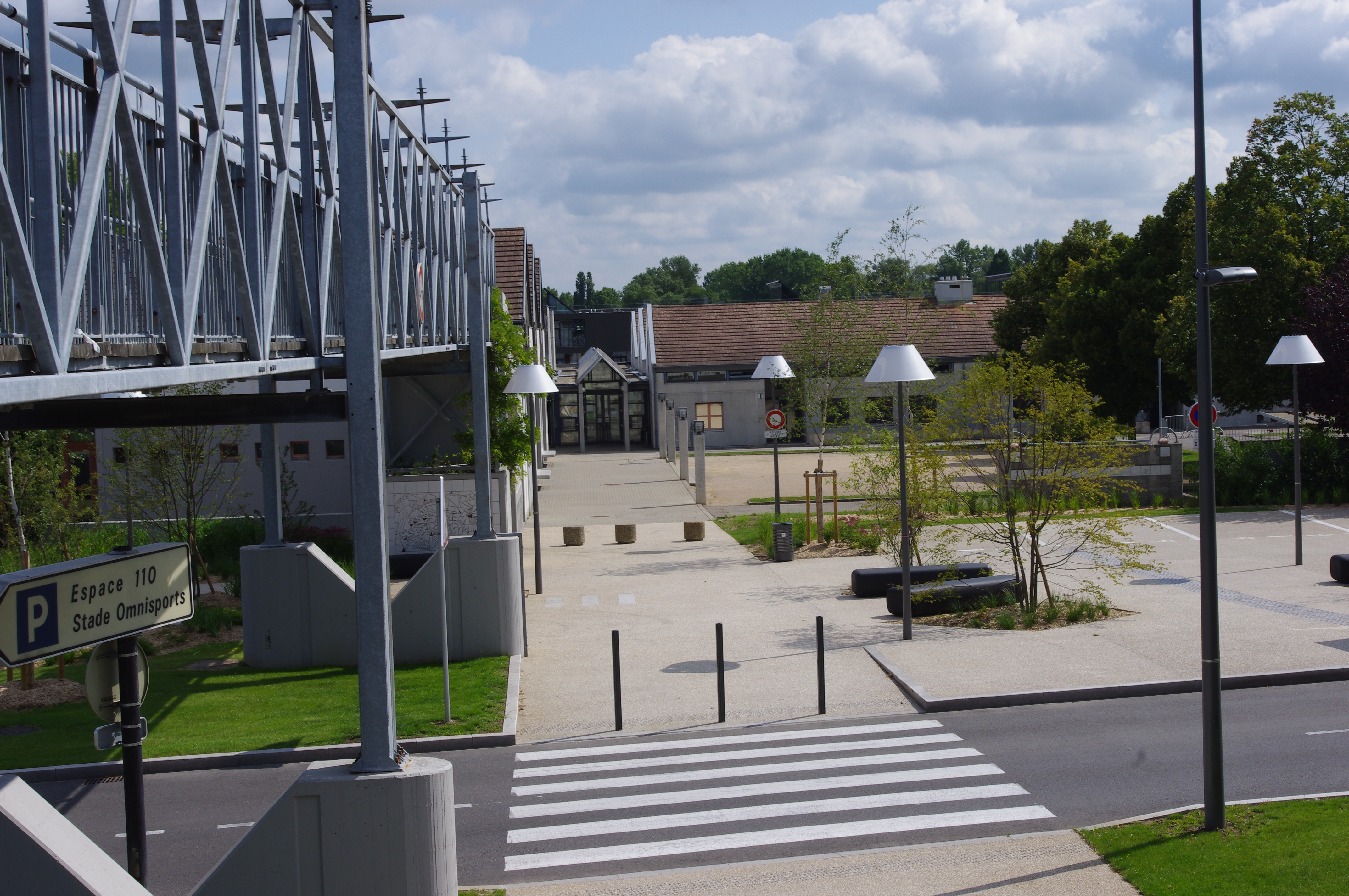 L'espace 110 qui accueille tous les ans le festival BEDECINE depuis 1984